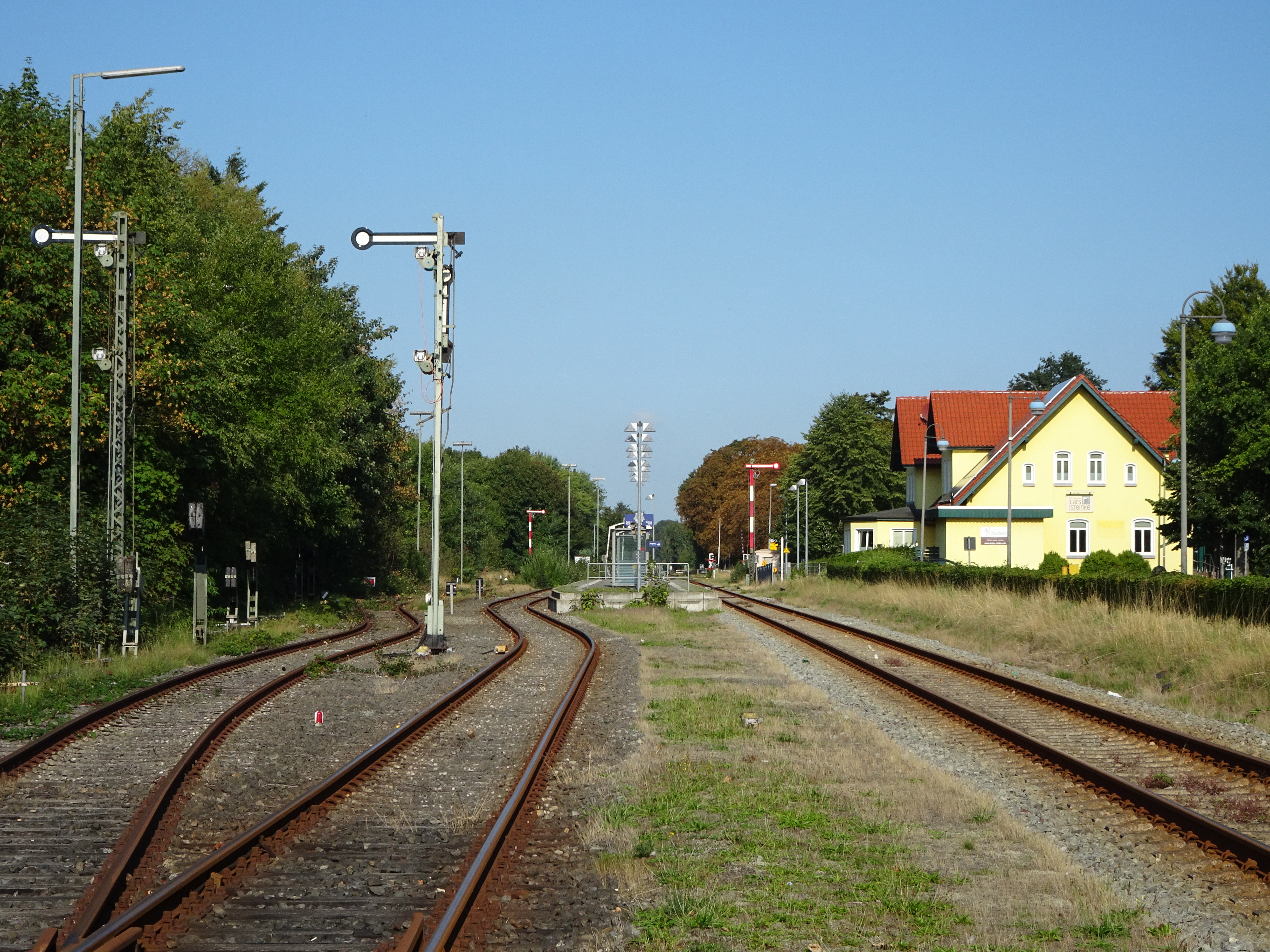 Gleisanlagen und Bahnsteig Schortens-Heidmühle